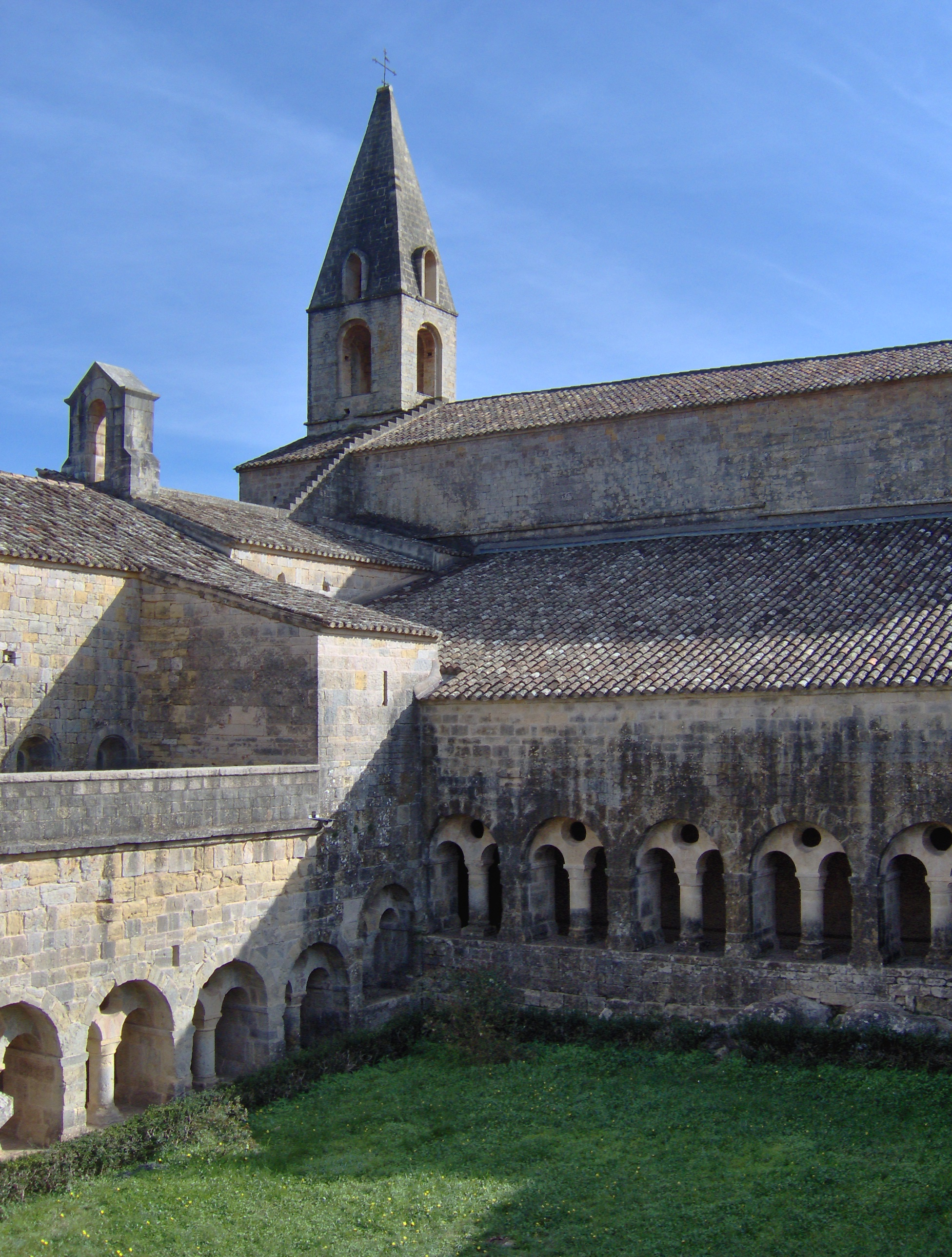 Cloître de l'abbaye du Thoronet.